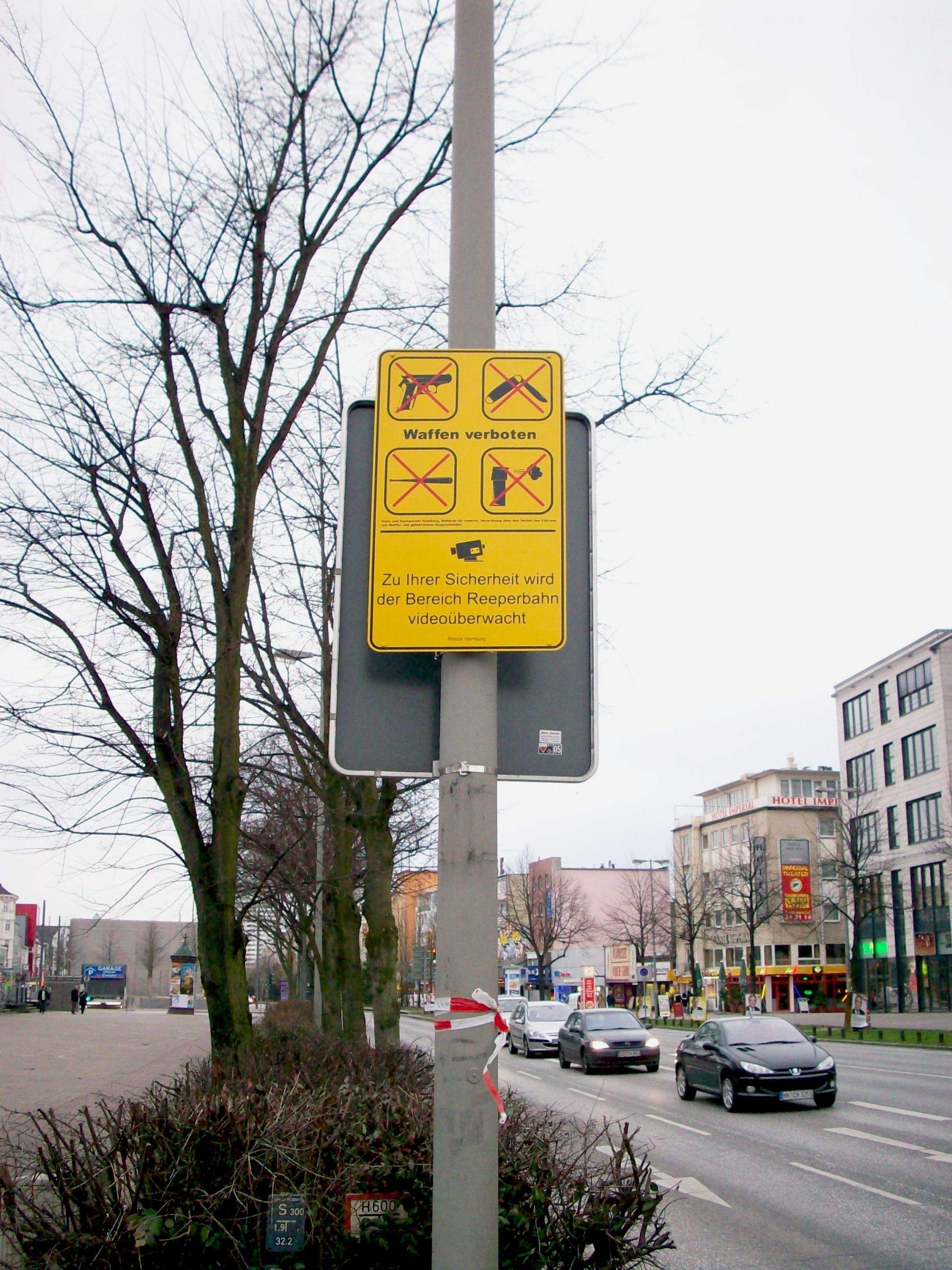 Kennzeichnung des (Waffenverbotsgebiets Reeperbahn) und der Videoüberwachung, Hamburg.